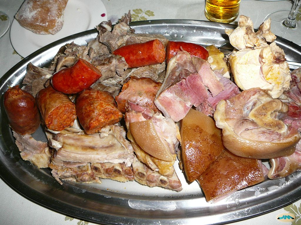 Carne do cocido galego